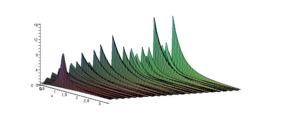 module de la fonction zeta dans [0..3]x[0.1..200]